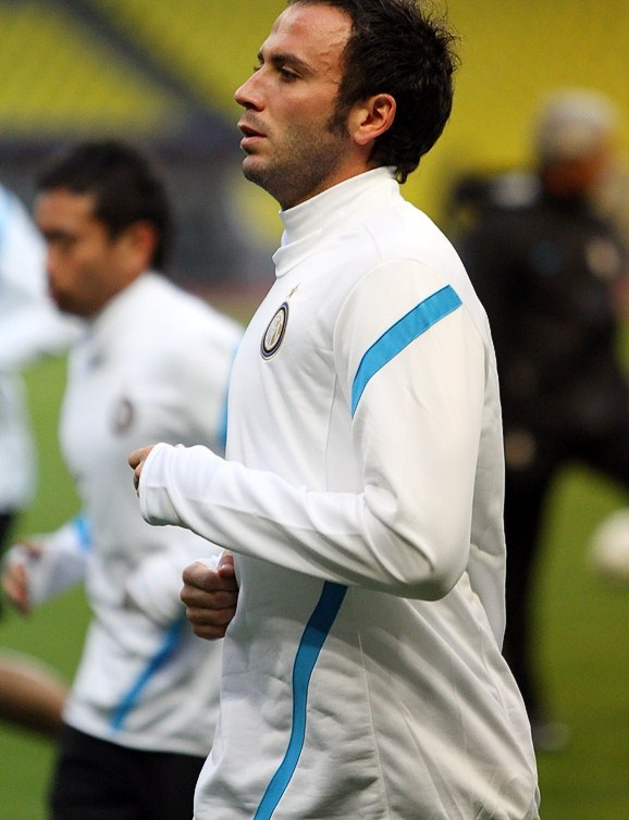 Giampaolo Pazzini